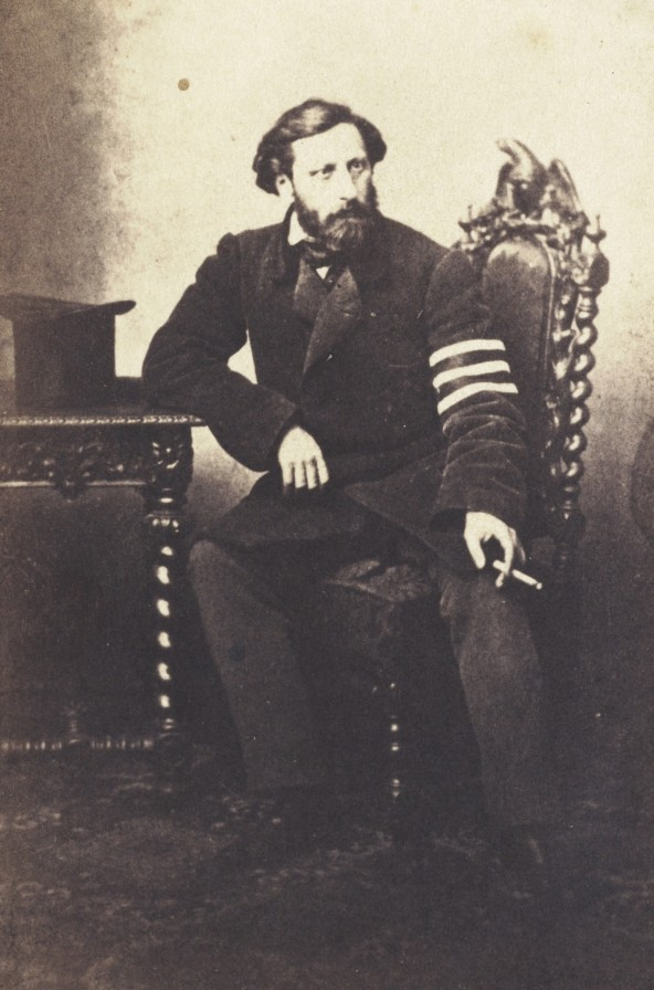 Józef Kenig